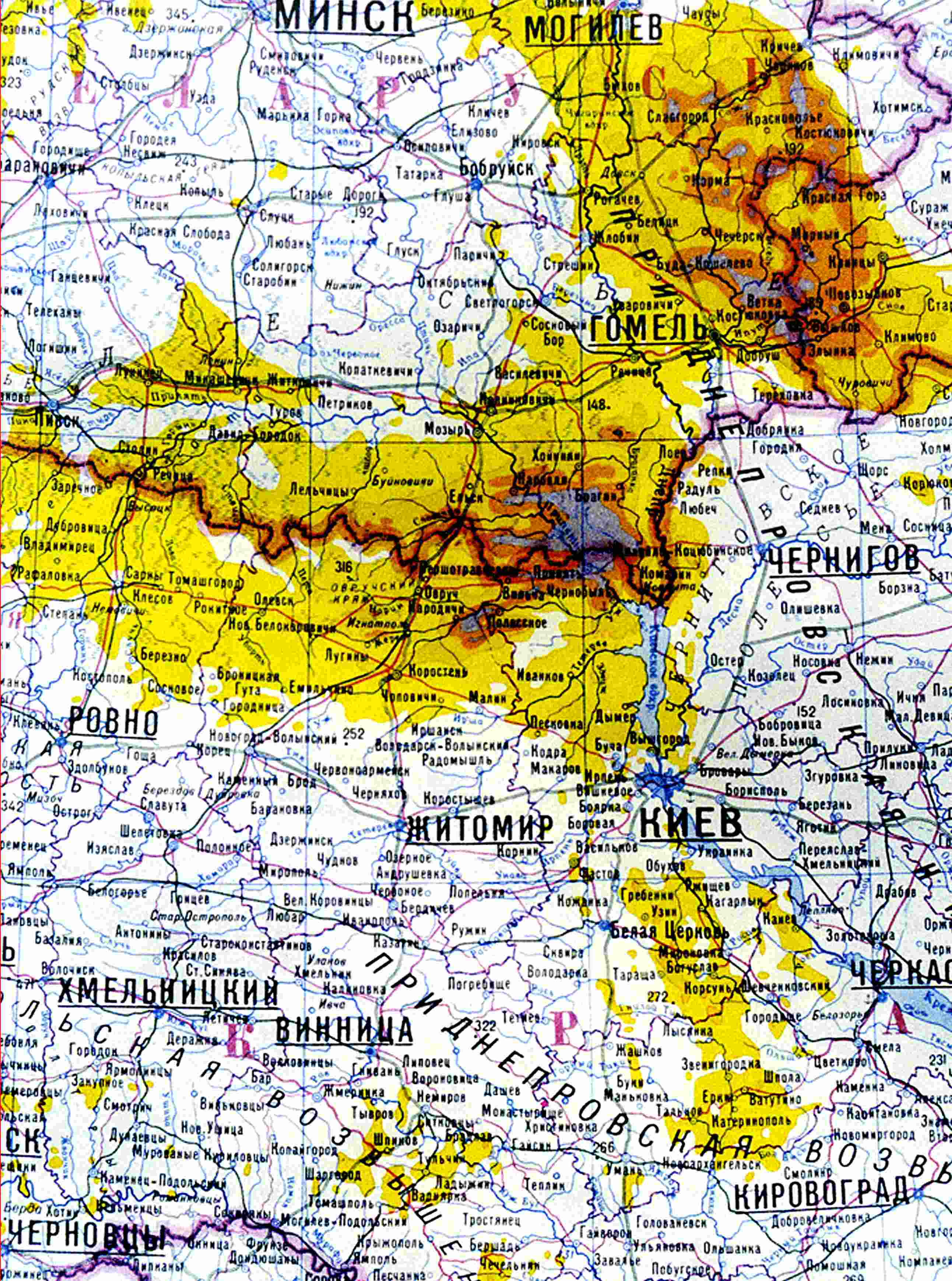 Radiokative Belastung in der Umgebung von Tschernobyl